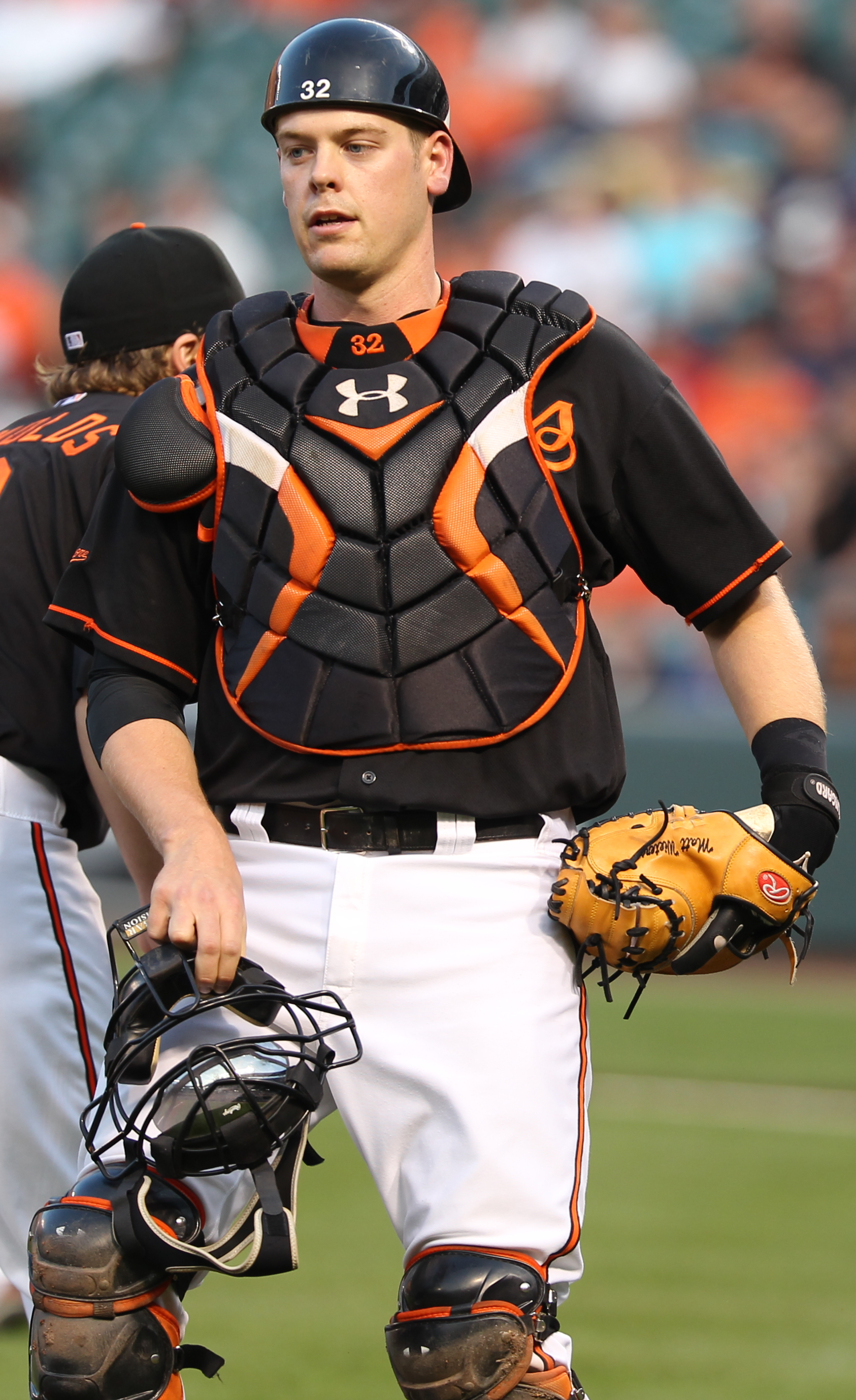 Matt Wieters